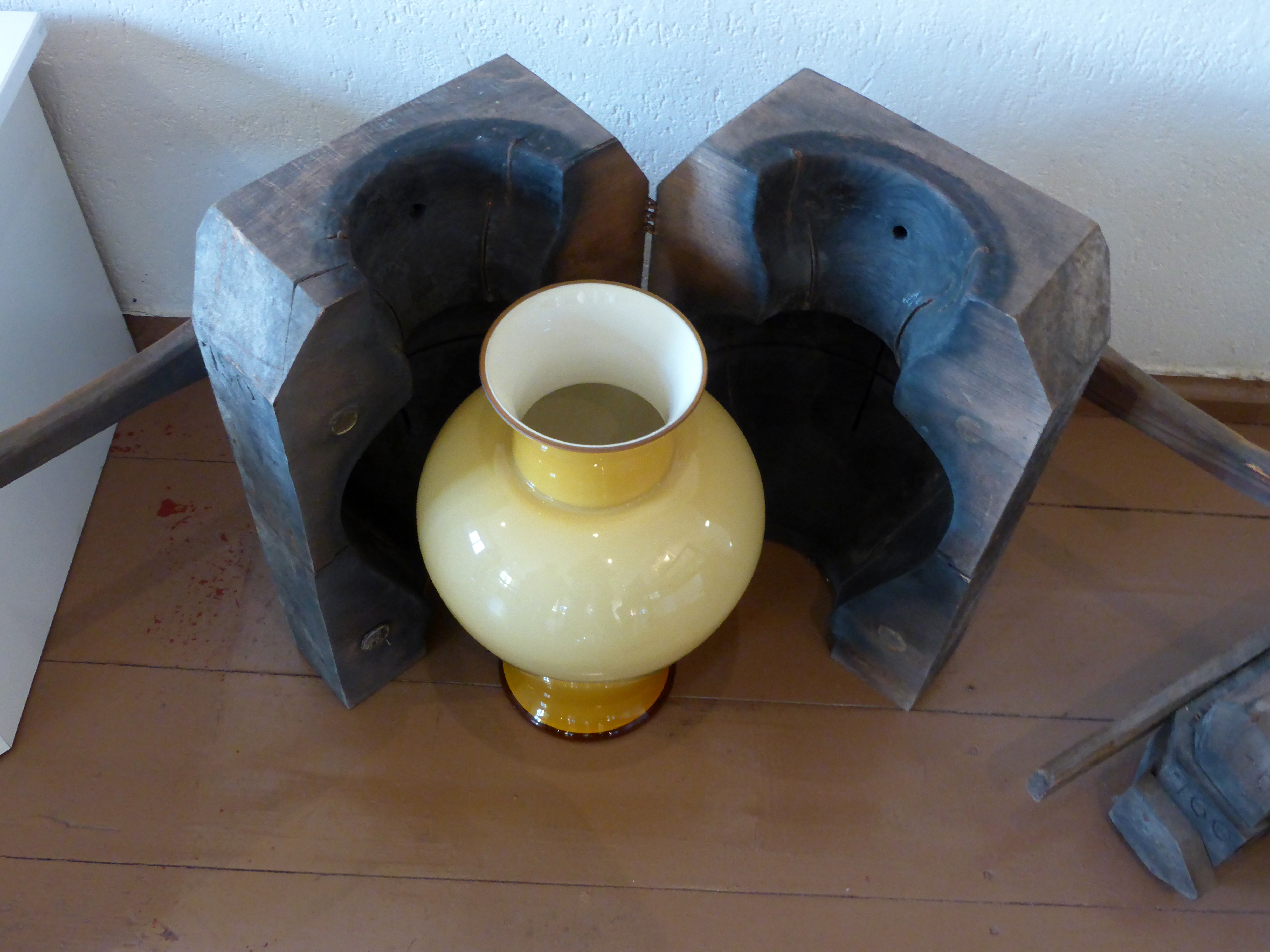 Glasmacher Holzform im Glashüttenmuseum des Erzgebirges in Neuhausen/Erzgebirge - Landkreis Mittelsachsen.